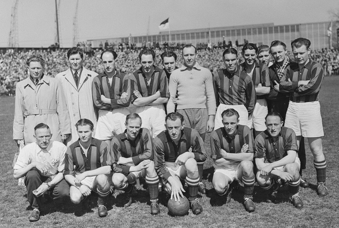 DWS elftal.